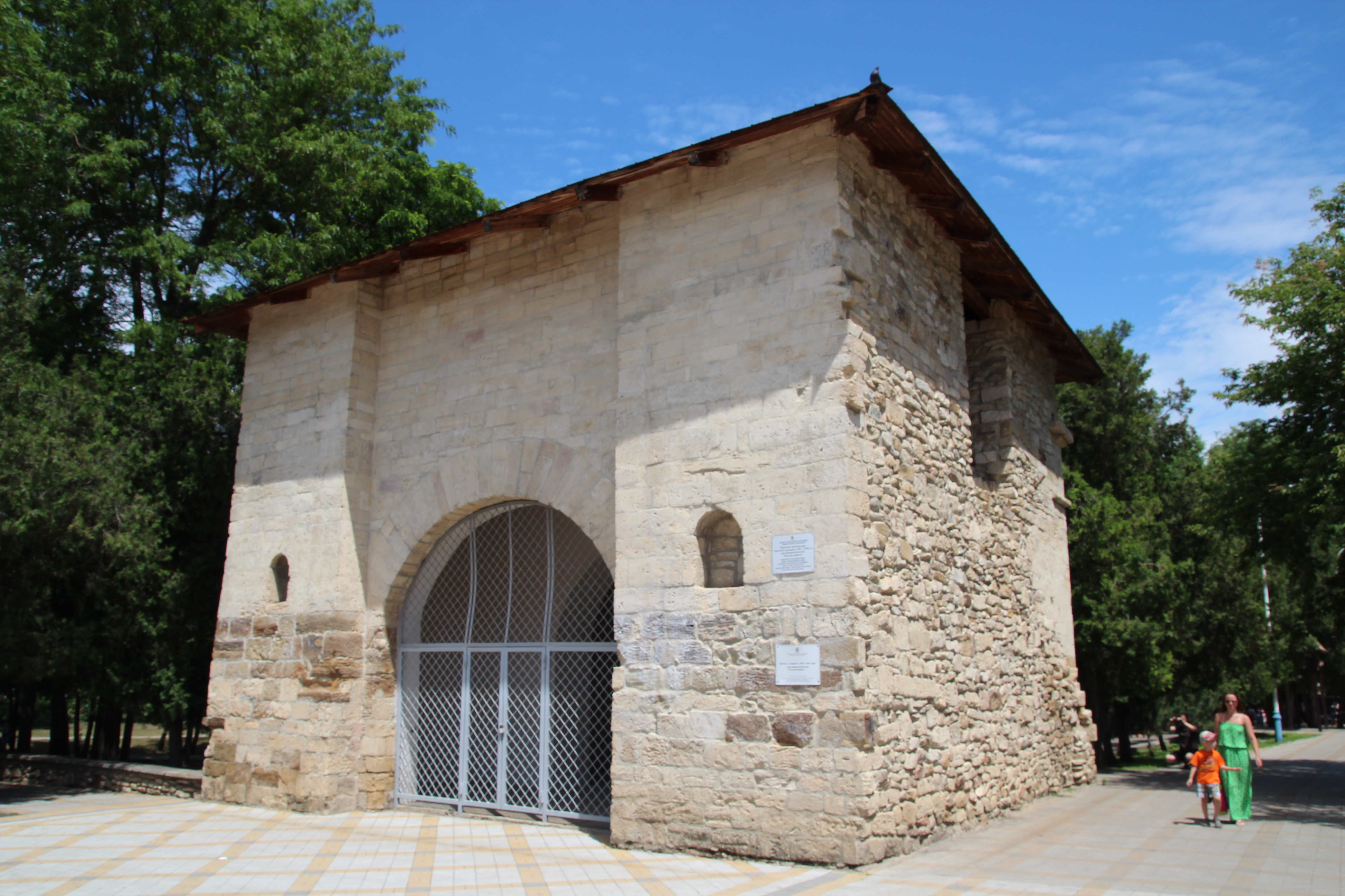 Русские ворота и остатки стен крепости: улица Пушкина (вход в парк 30-летия Победы), Анапа, город-курорт Анапа, Краснодарский край